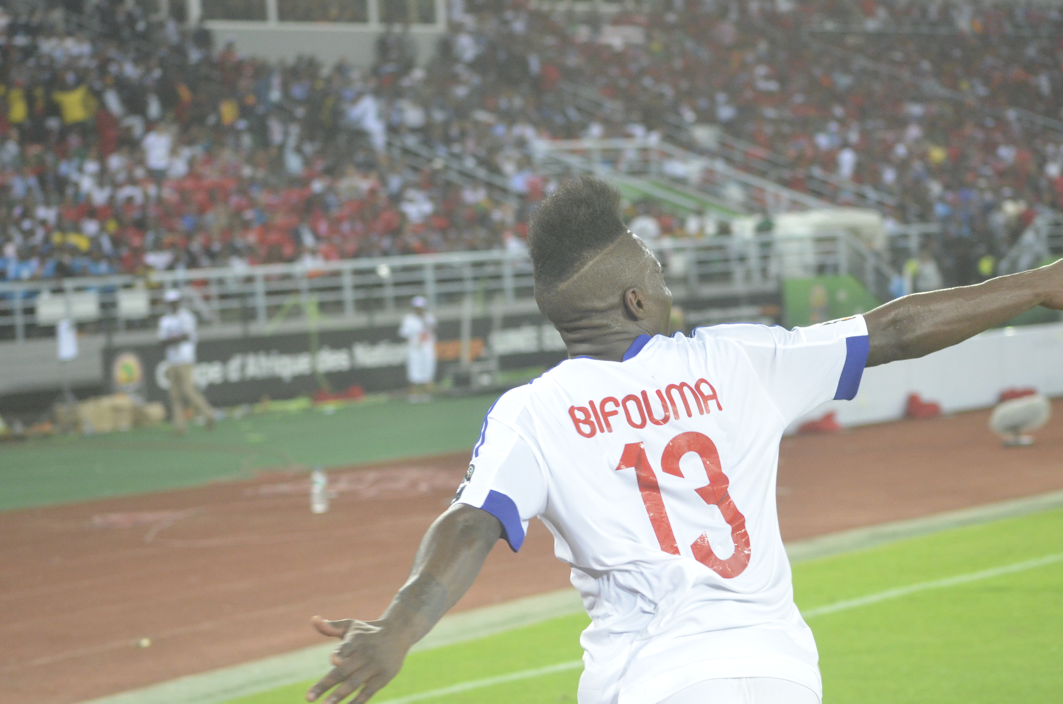 L'attaquant congolais jubilant après son but contre la guinée équatoriale lors de la Coupe d'Afrique des Nations en 2015 This is an image from Cameroon